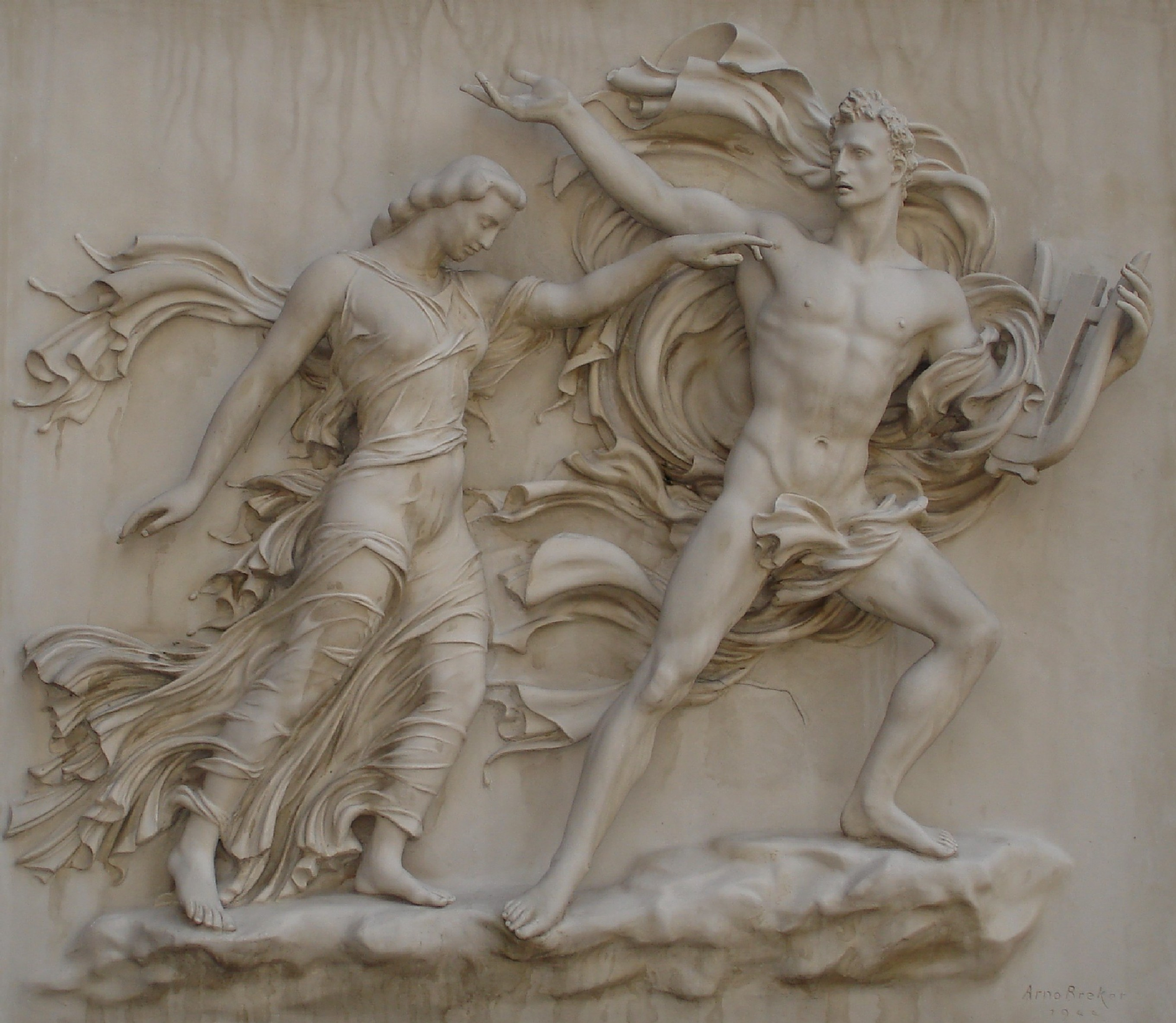 Copyright: Museum Arno Breker/MARCO-VG, Bonn Hernieuwde toestemming tot afbeelden aan Jos43 verleend op 20.03.07.